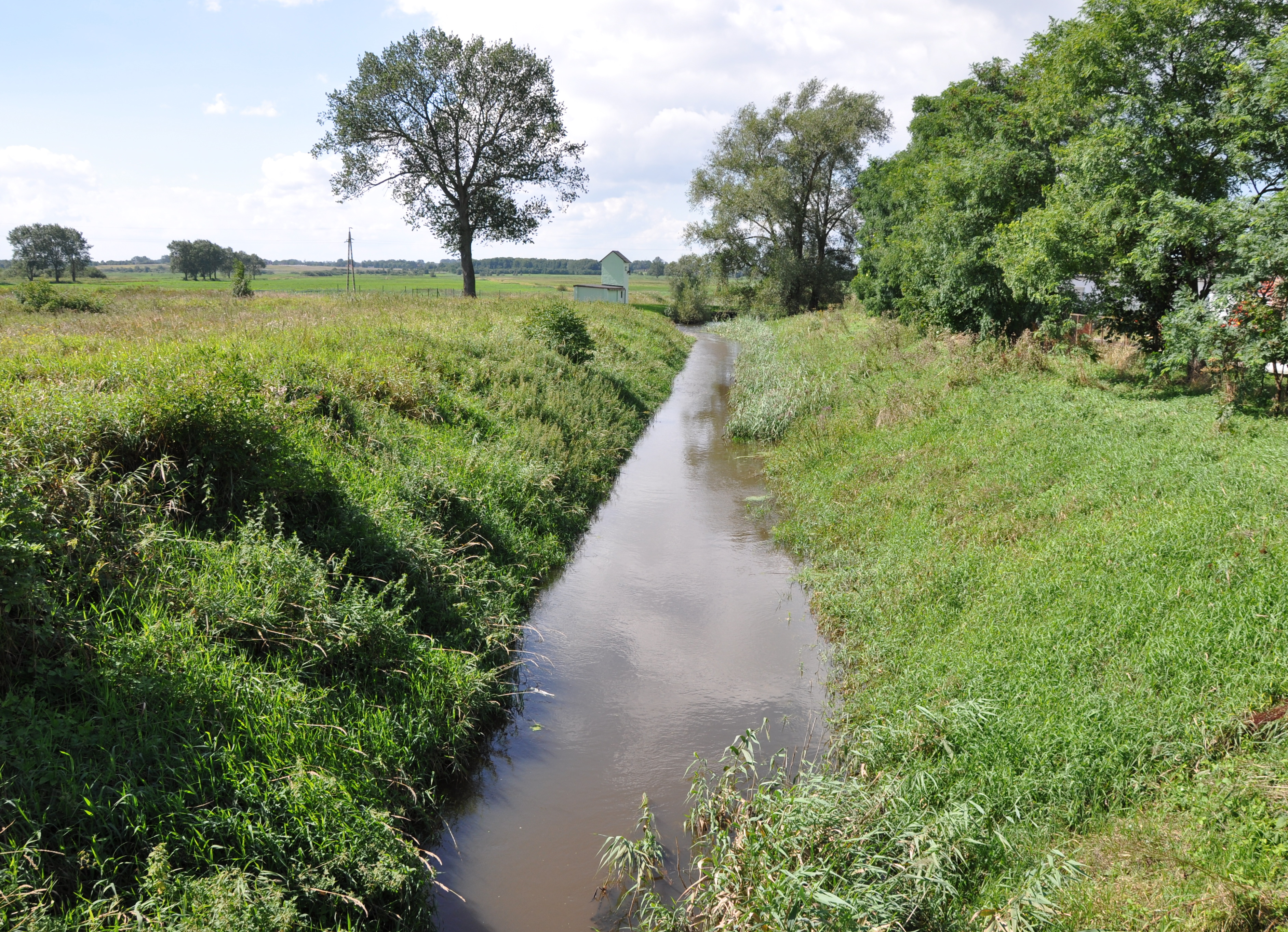 Struga Strzeżenica w Kazimierzu Pomorskim – ujęcie z mostu w kierunku zachodnim